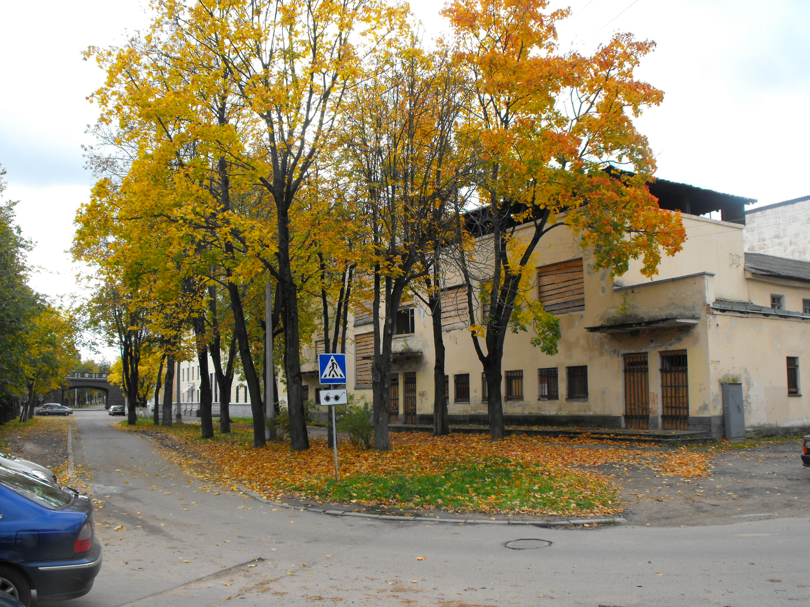 Территория бывшего гетто в Витебске в 1941 году. Занимало район клуба металлистов (здание справа) и территорию в пределах нынешних улиц Набережной, Ильинского, Кирова, Комсомольской и Энгельса. Здание слева - гостиница "Двина".